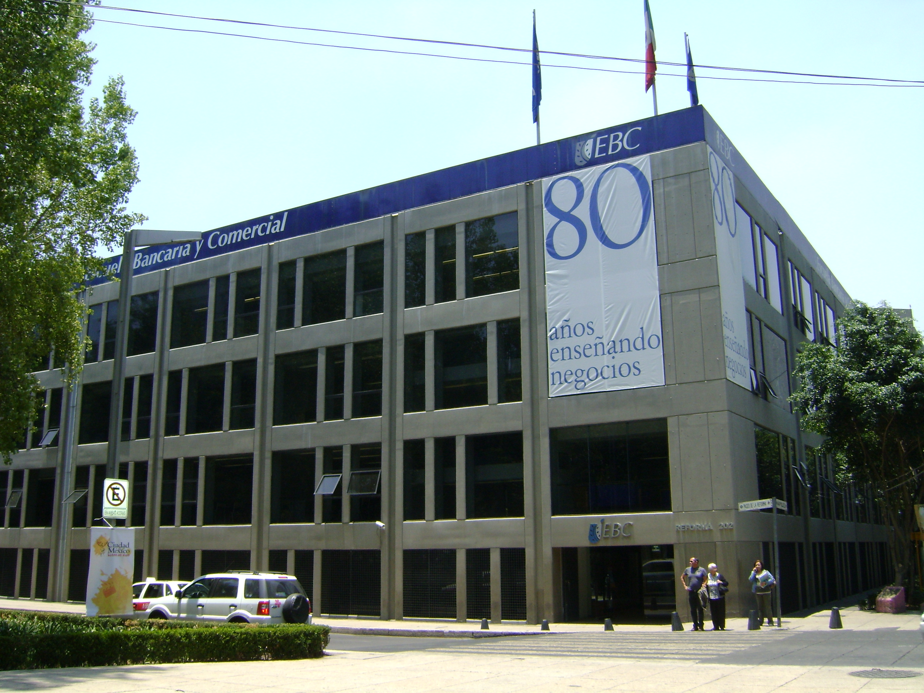 ESCUELA BANCARIA Y COMERCIAL UBICADA EN PASEO DE LA REFORMA